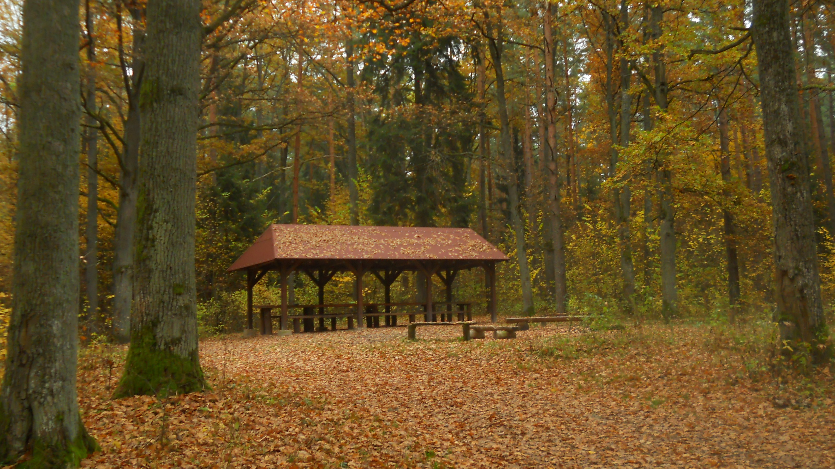 Wiata turystyczna z miejscem na ognisko przy Drodze Dubińskiej (niebieski szlak), kwadrat 382 .